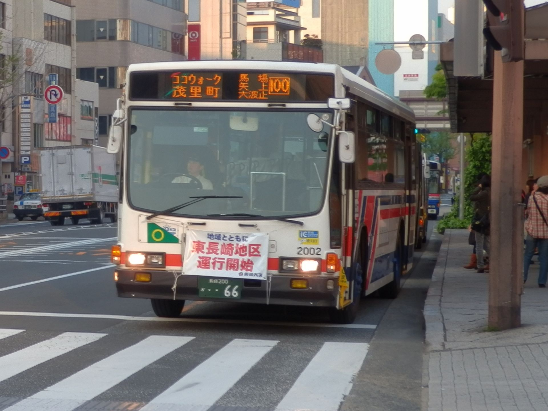 長崎バス 2002号（新急行色）